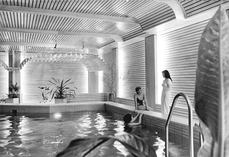 ADN-ZB 14.3.81 Leipzig- Hotel Merkur - das Hallenschwimmbad.